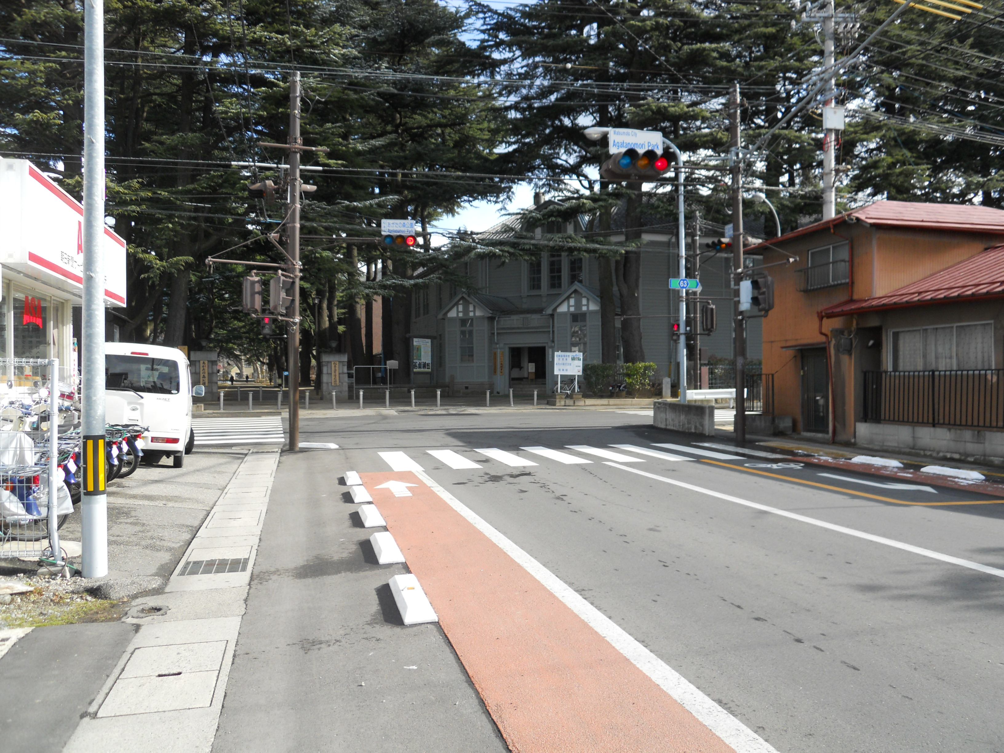 あがたの森公園交差点